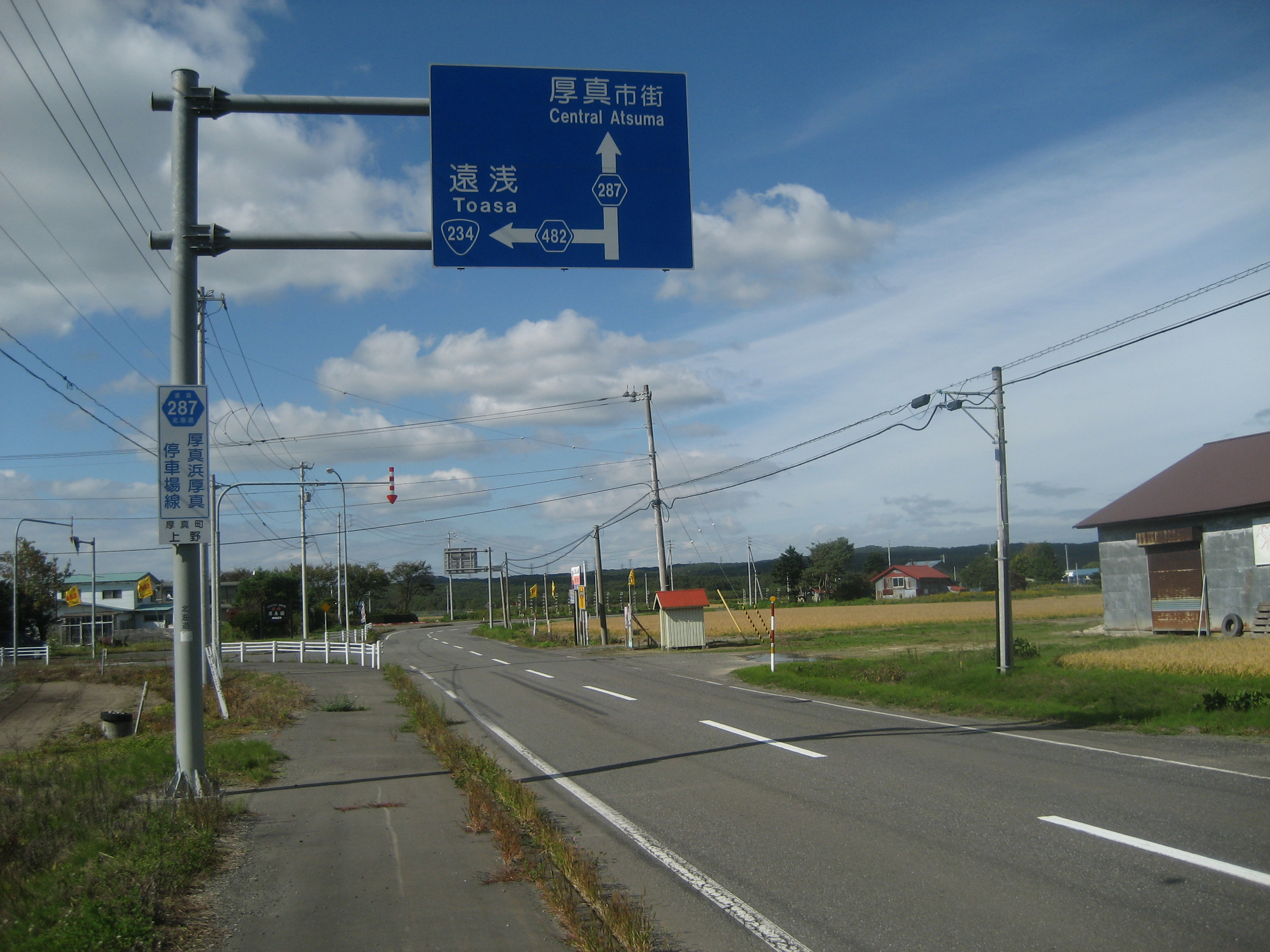 北海道道287号線厚真町（厚真町市街地方面を撮影）